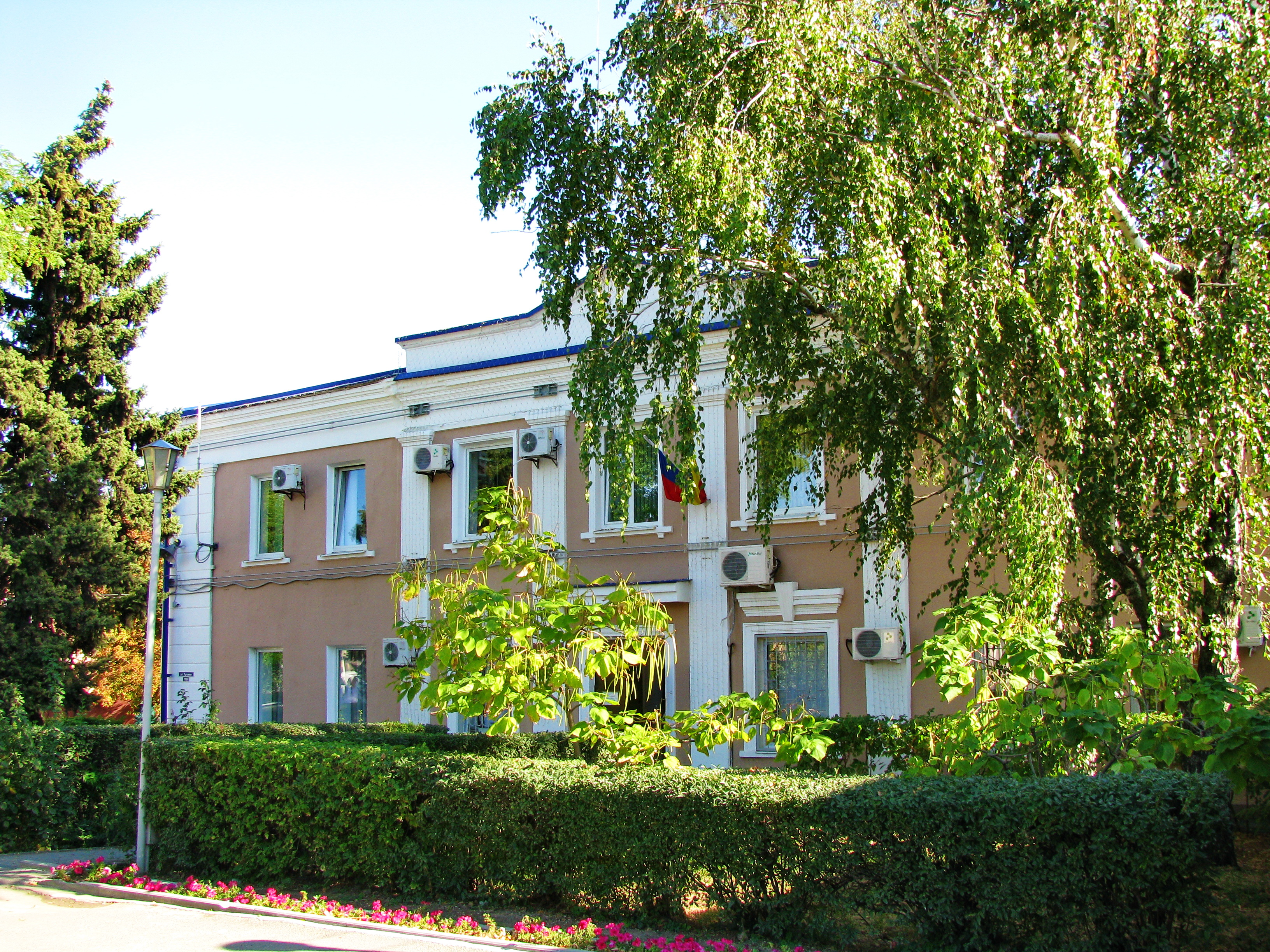 Администрация Аксайского городского поселения: Аксай, улица Гулаева, 108